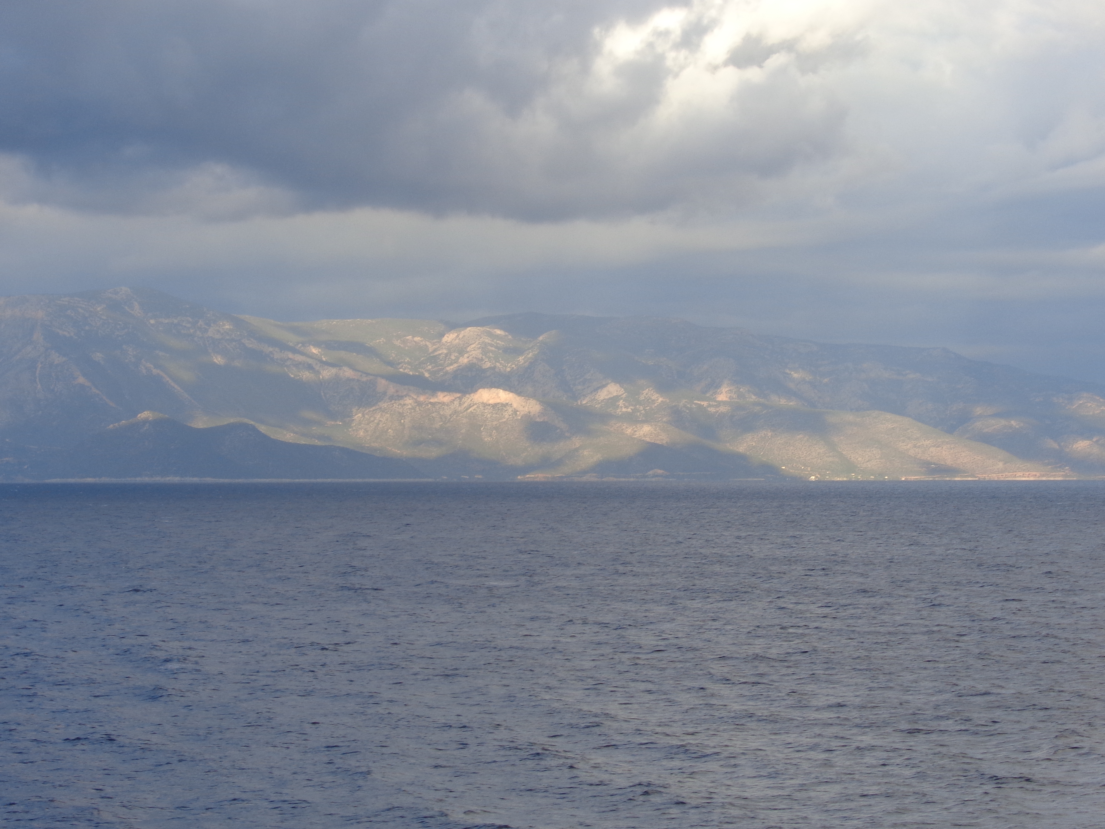 Westküste des Argolischen Golfs, fotografiert von MS Deutschland.